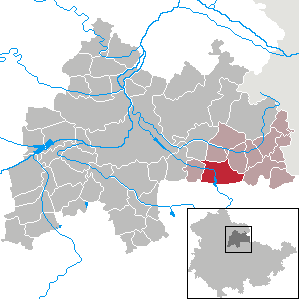 Großbrembach in Thuringia - District Sömmerda